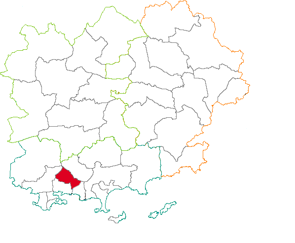 Situation du canton dans la département du Var (83), France